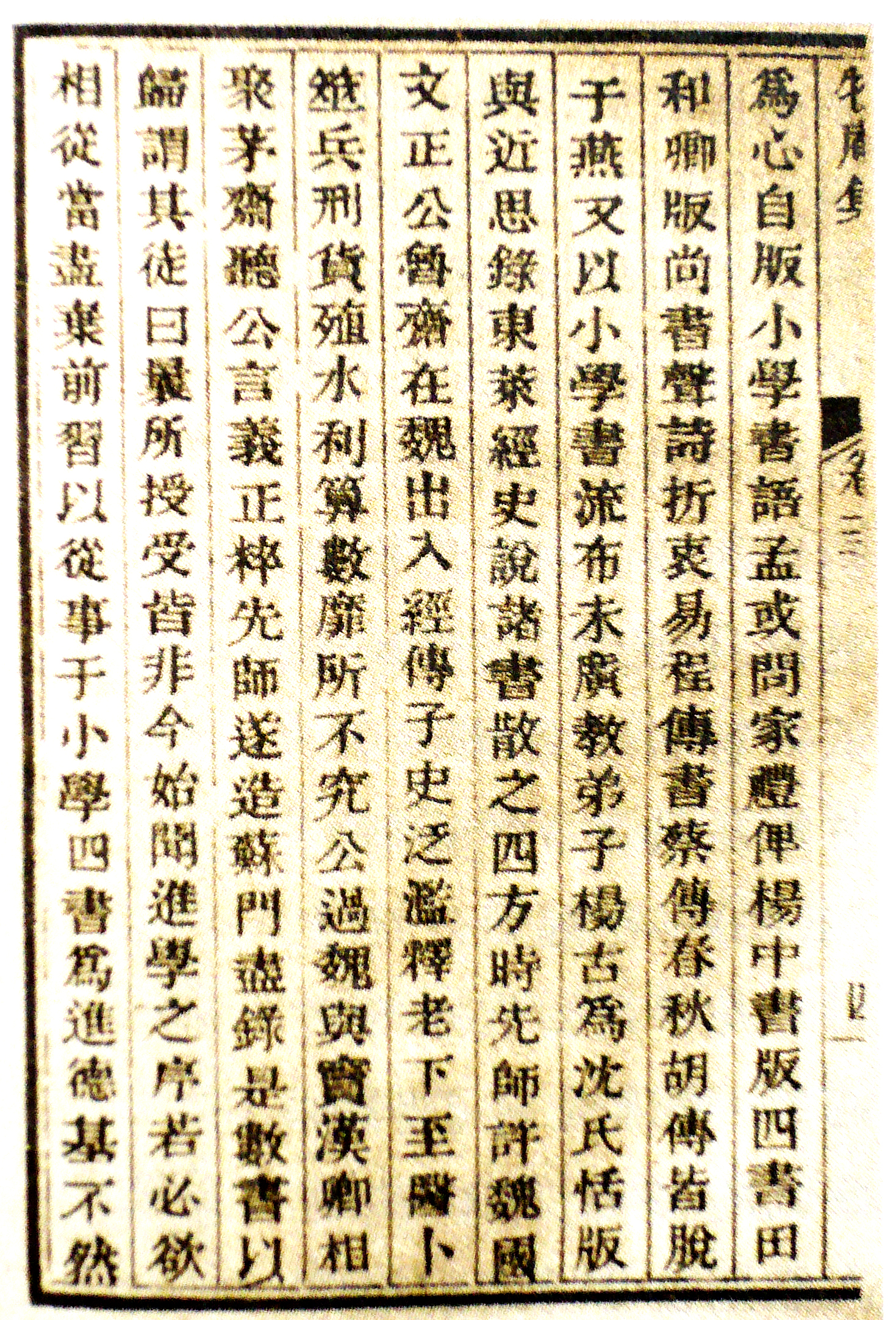 清乾隆年武英殿聚珍版书页